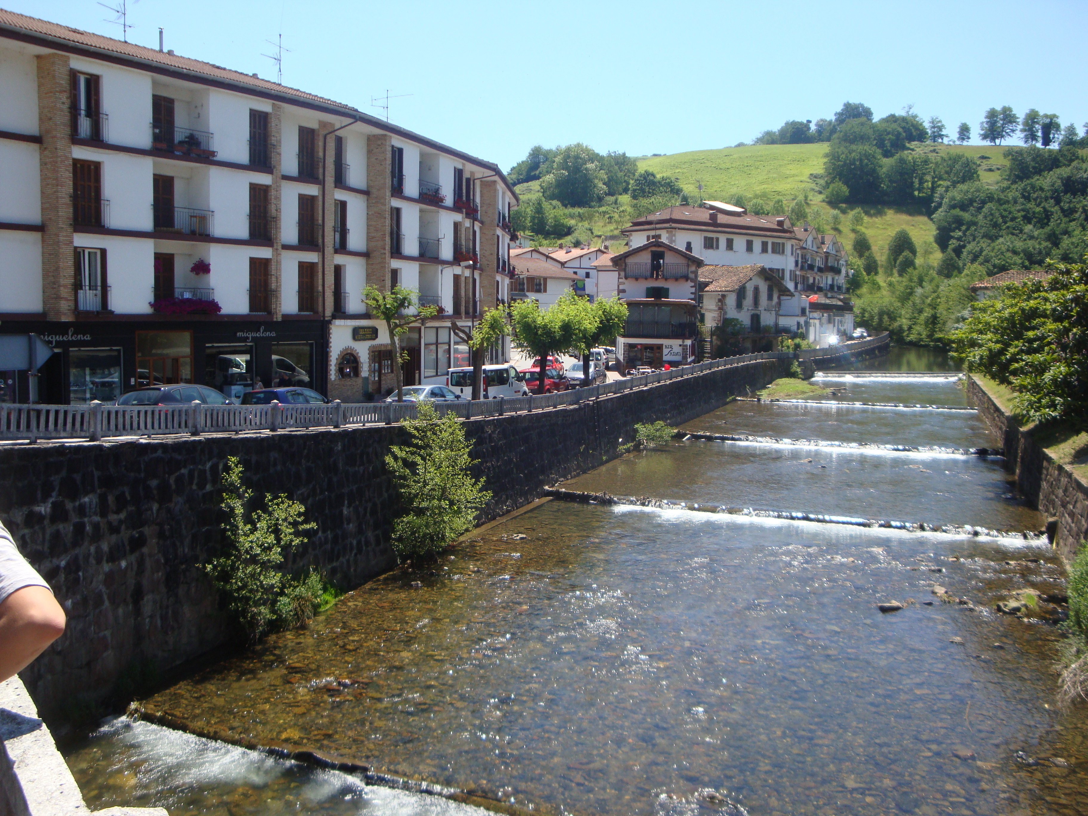 Río Ezkurra a su paso por Santesteban (Navarra)